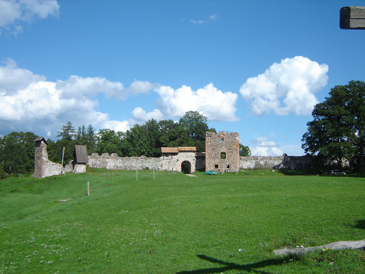 Karksi ordulinnus. Eelnnuse kaitse müür ja tornid.